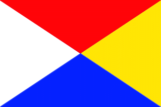 UN 중립국 관리 사무소 깃발